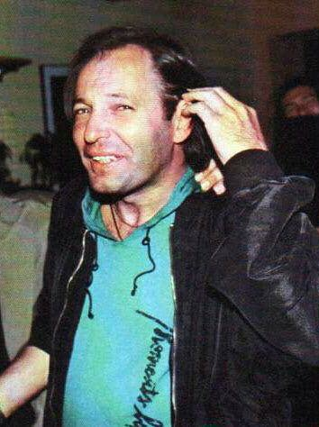 1990 Riccione